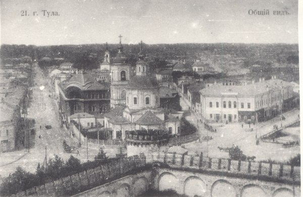 Крестовоздвиженская церковь в Туле